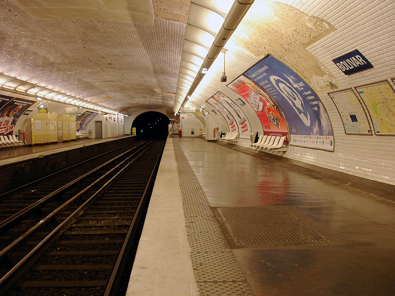 Station Bolivar, de la ligne 7bis du métro de Paris, France.